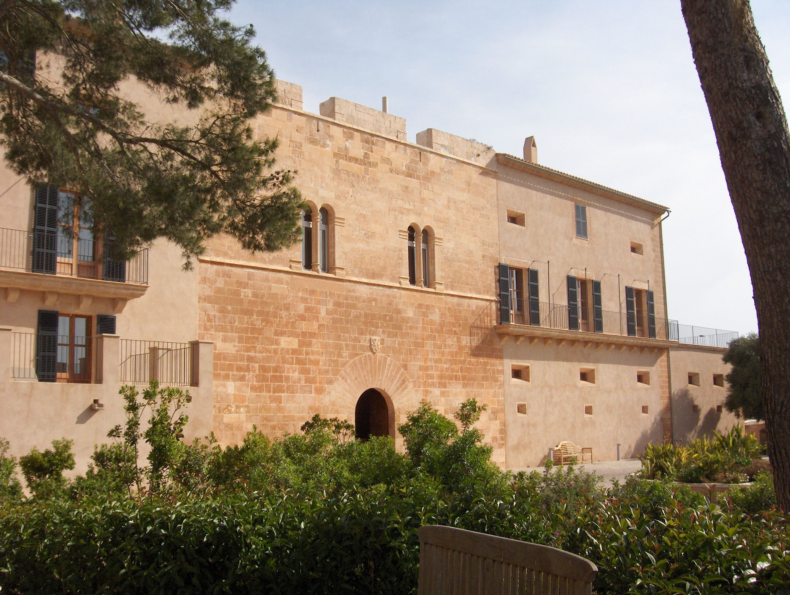 Façana principal de les cases de la possessió de Sa Torre, a la marina de Llucmajor, Mallorca.